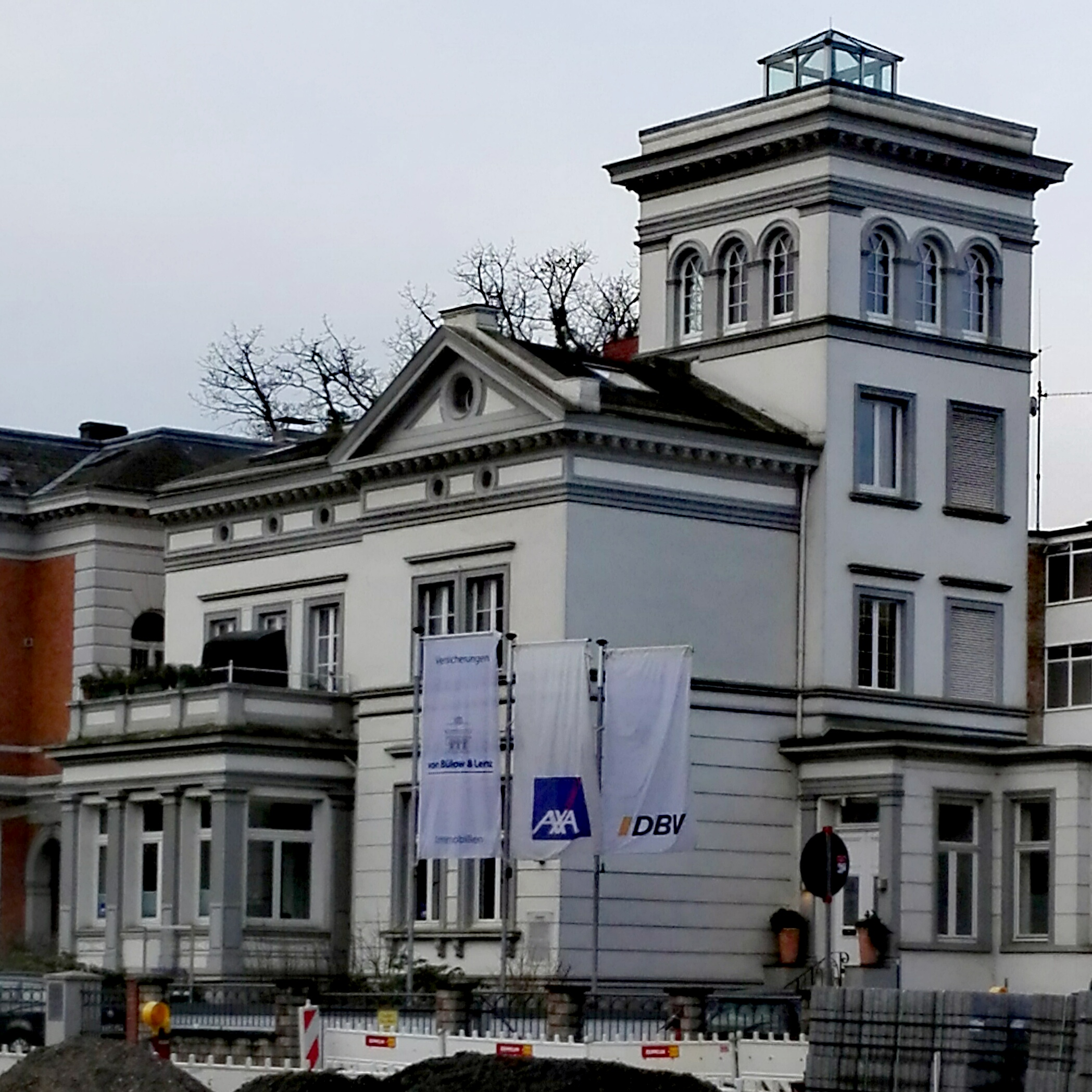 Vorabversion